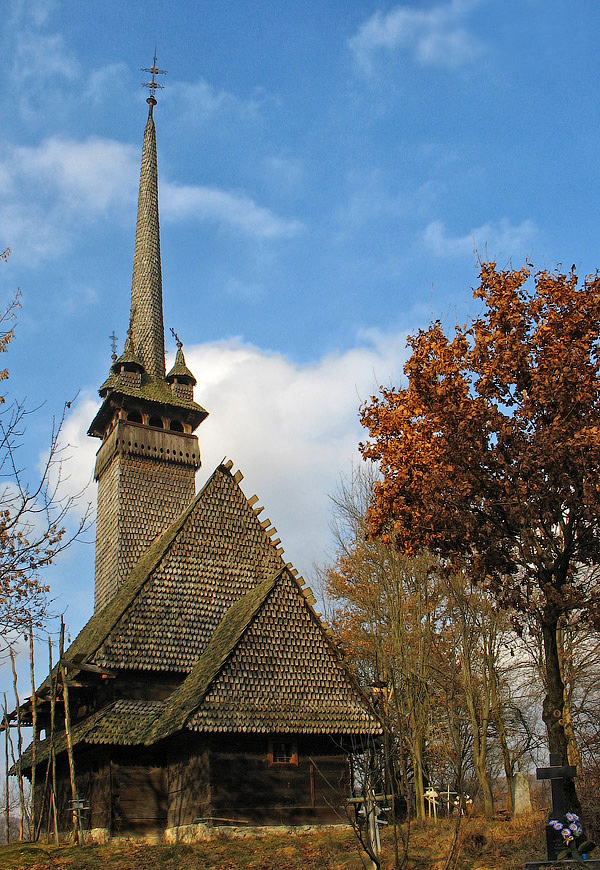 Миколаївськи церква в с.Данилово, Закарпаття (1779 р.)